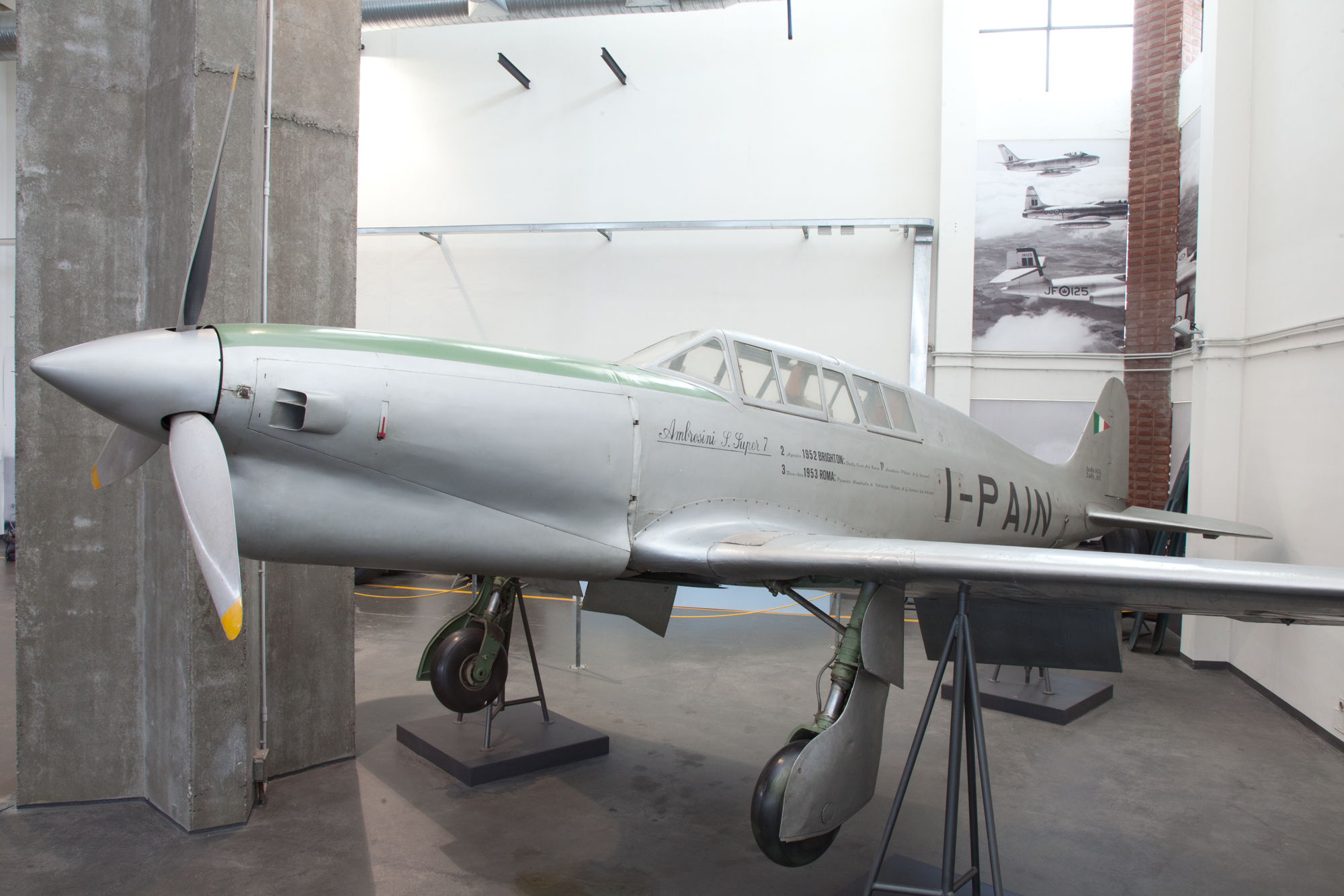 Monomotore da addestramento SAI Ambrosini Super7 esposto al Museo nazionale della scienza e della tecnologia Leonardo da Vinci di Milano.